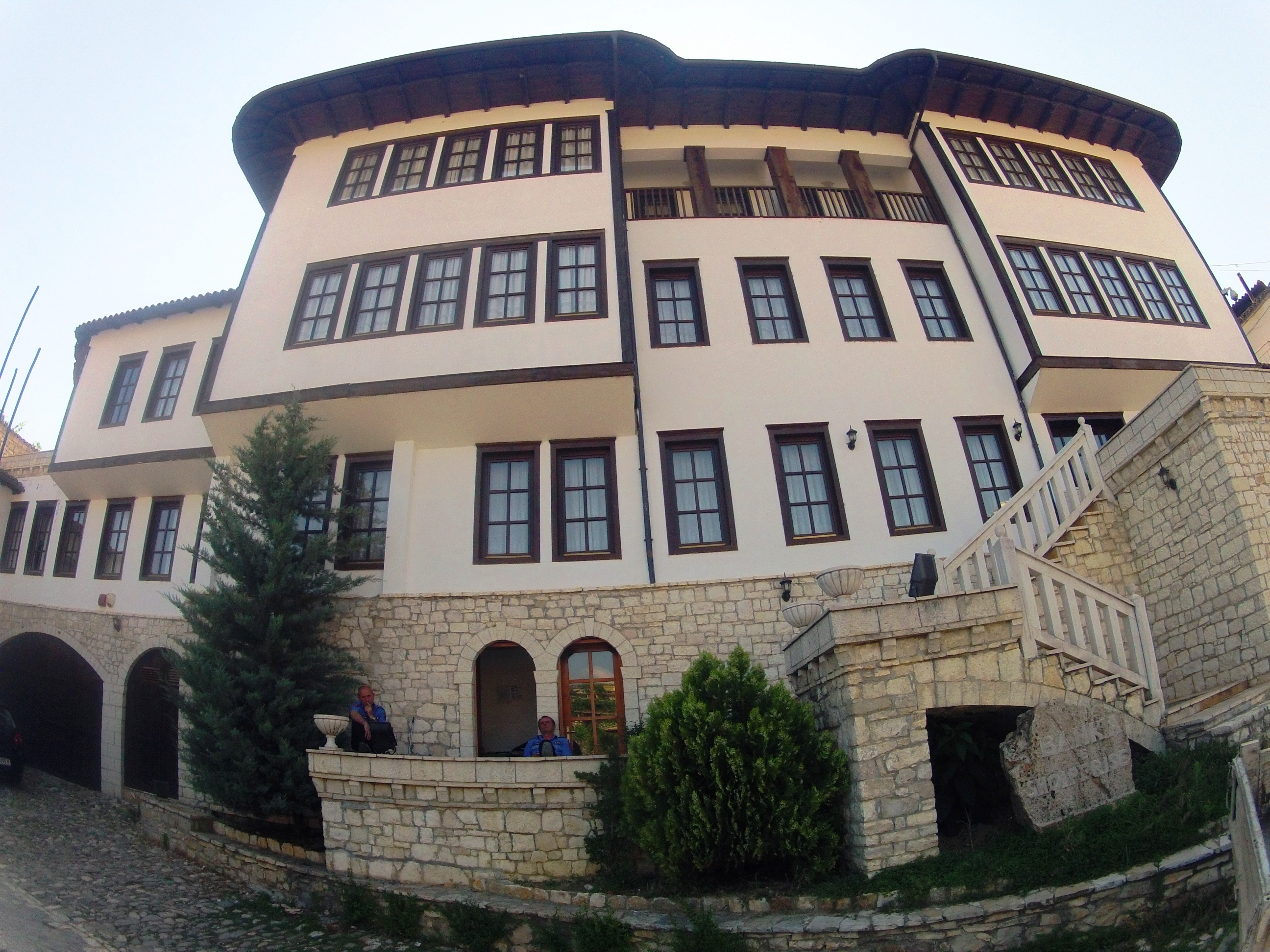 Banesa e Lip Pulit